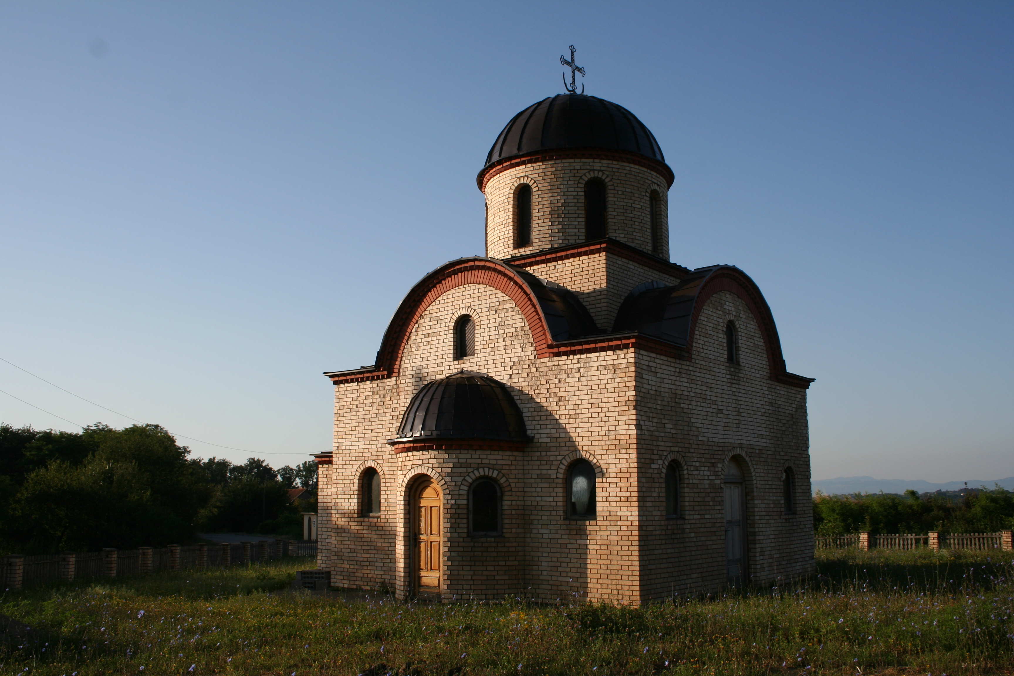 Crkva Svete Trojice, Trbosilje